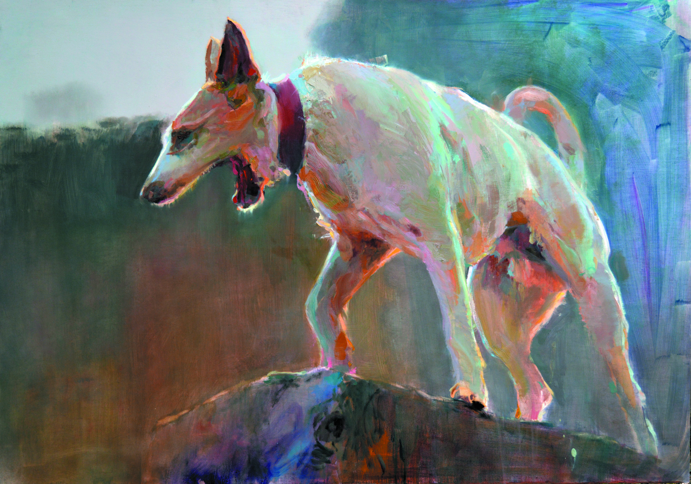 El grito Óleo sobre tabla Alberto David Fernández Hurtado